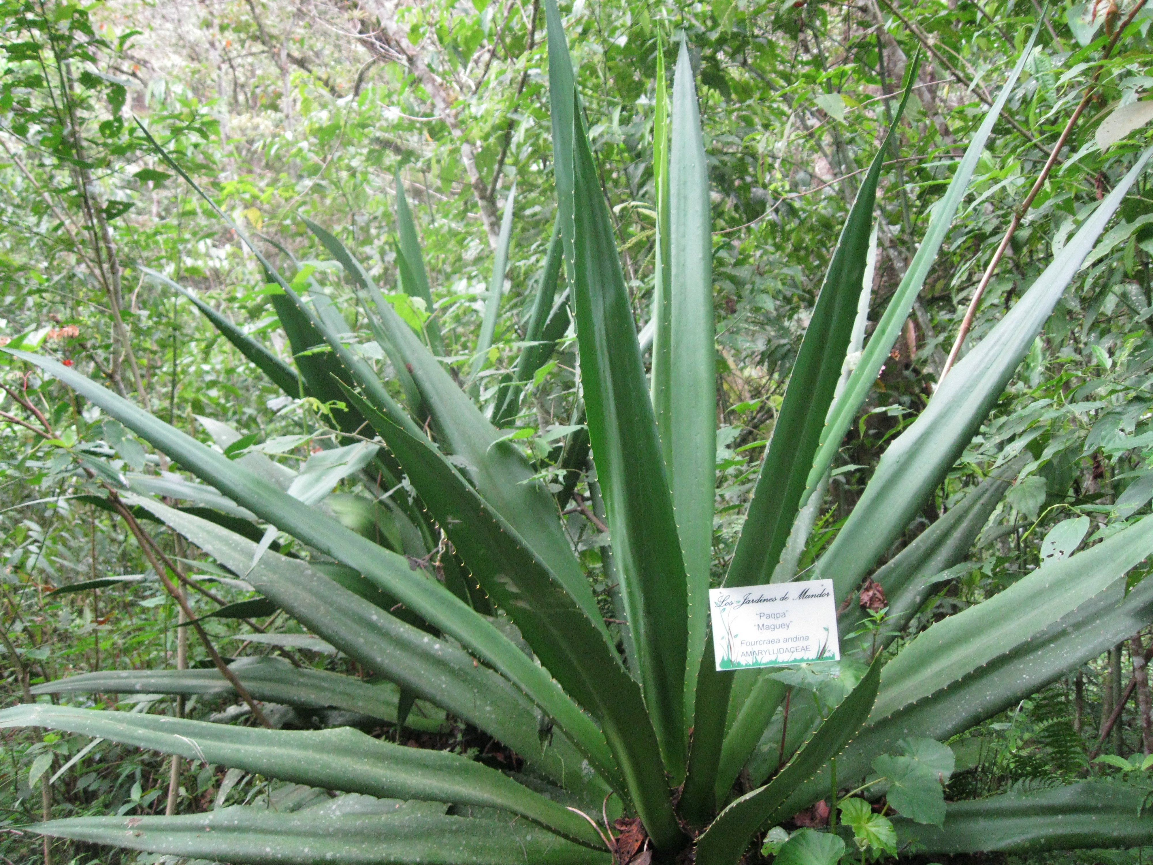 Los Jardines de Mandor